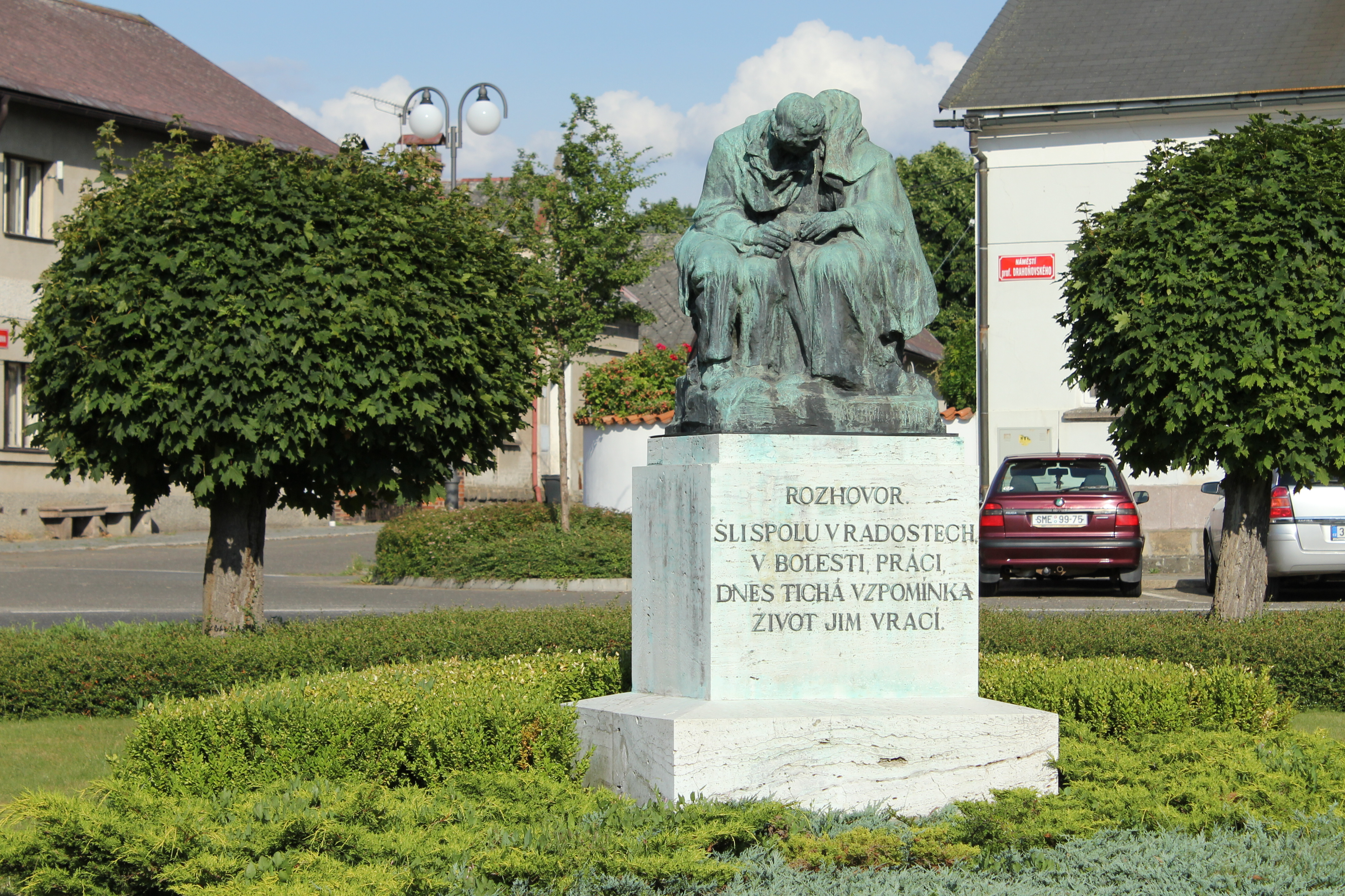 Sousoší "Rozhovor", Josef Drahoňovský